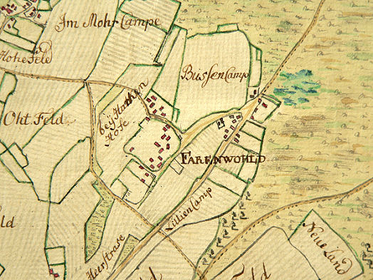 Ausschnitt einer Landkarte, hier das Dorf Vahrenwald, damals Fahrenwohld, von Hannover von 1771